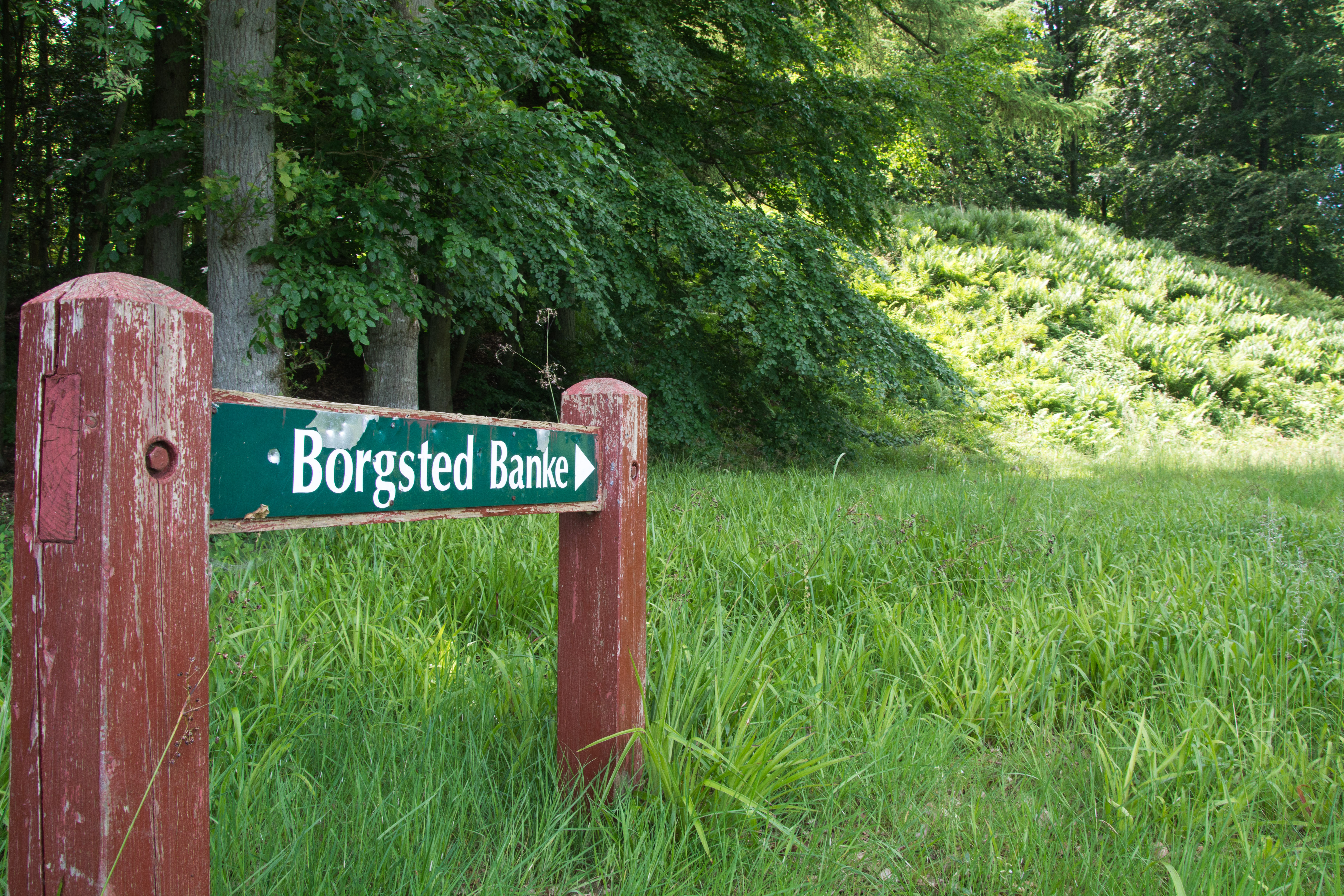 Borgsted Banke (også kaldet Borgsted Bakke) ved Lillebælt udfor Fænø kalv